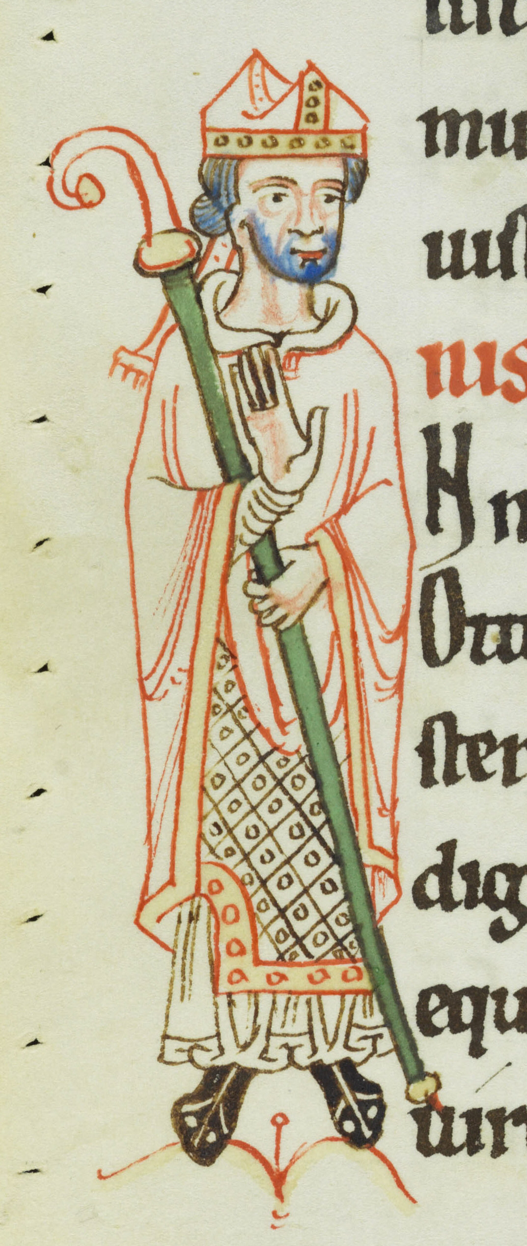 Acta Sancti Petri in Augia; St. Gallen, Kantonsbibliothek, Vadianische Sammlung, VadSlg Ms. 321, S. 54, Bischof Otto II. von Konstanz